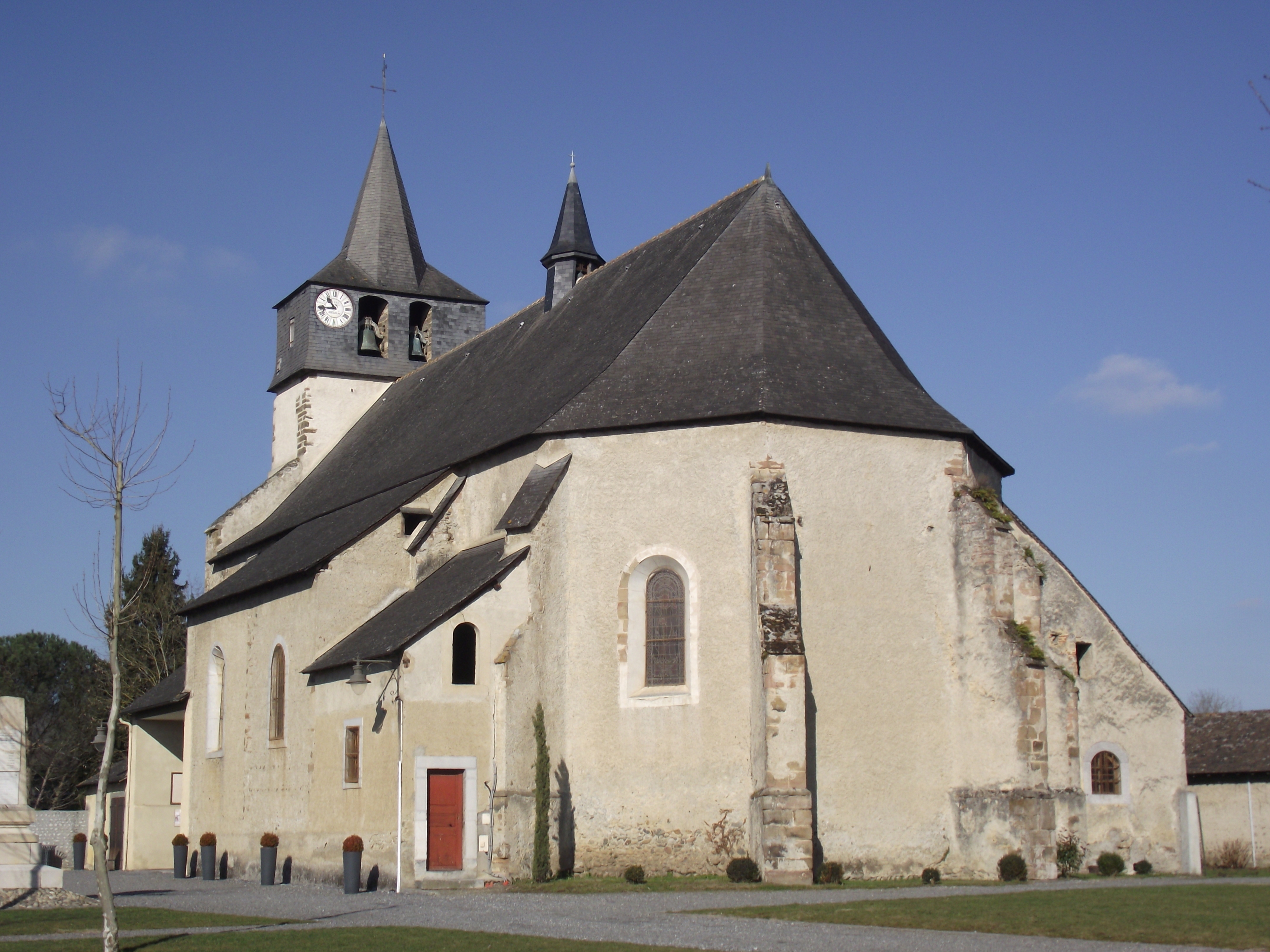 Église Saint-Fructueux d'Azereix (Hautes-Pyrénées, France)